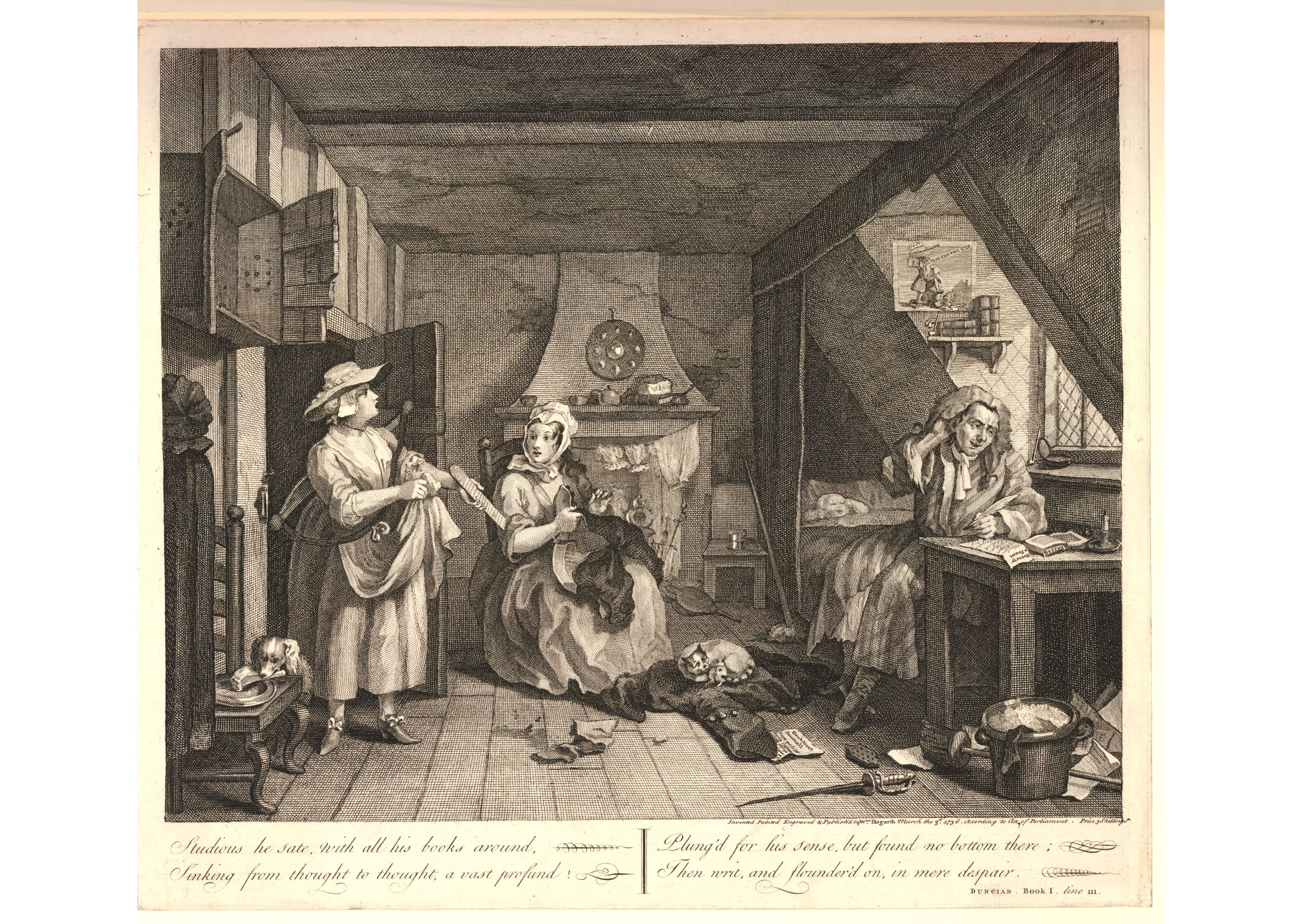 Deuxième version de la gravure de William Hogarth (1697-1764) qui contient sous le dessin un court extrait du poème La Dunciade (Alexander Pope).